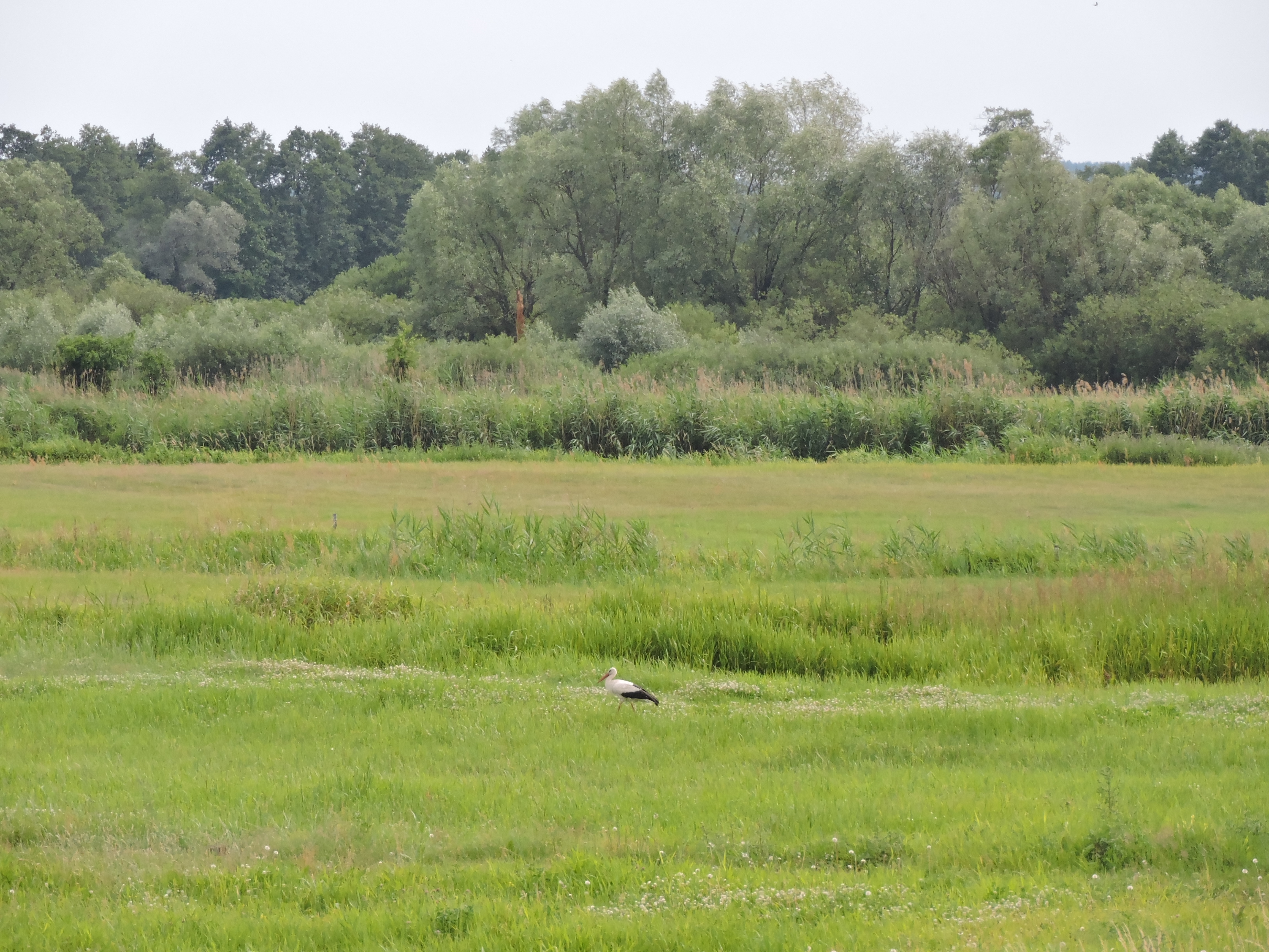 Bocian nad Wartą przy wsi Święte (27 czerwca 2016)